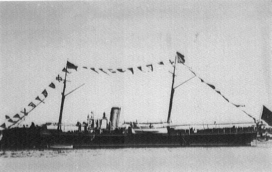 Cañonero-Torpedero Marqués de Molins.